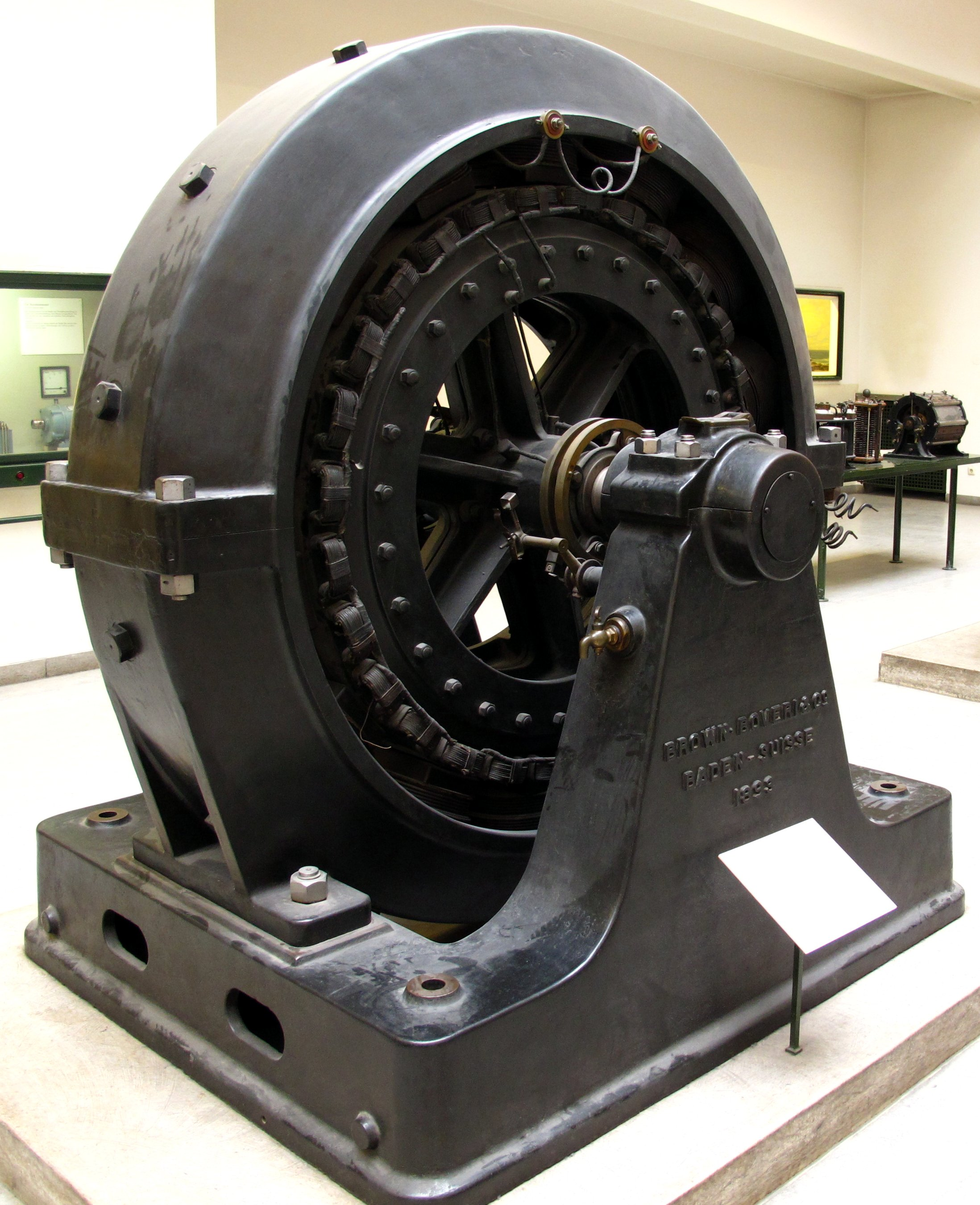 Zweiphasen-Synchronmotor, Außenpolmaschine. Dieser Motor diente zum Antrieb von Papiermaschinen in der Papierfabrik Cham in der Schweiz. Hersteller: BBC, 1893 Leistung: 88 kW Drehzahl: 300 RPM